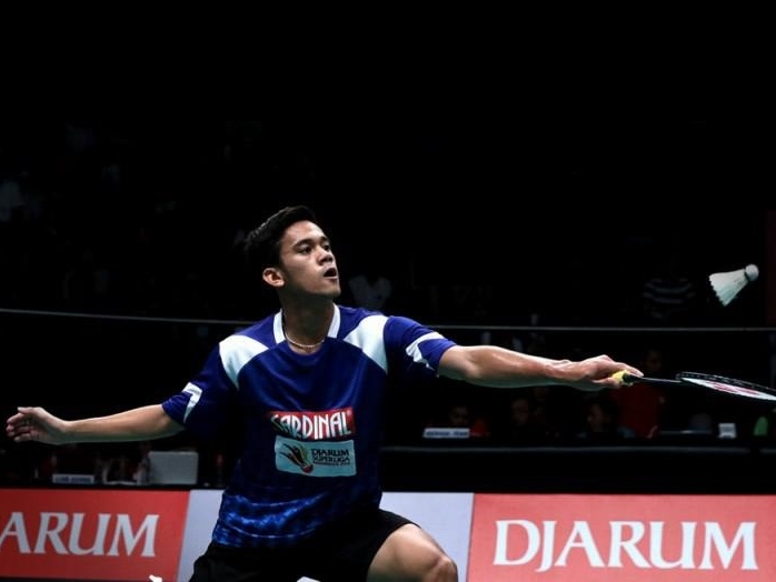 Firman Abdul Kholik (lahir di Kota Banjar, Jawa Barat, 11 Agustus 1997) adalah salah satu pemain bulu tangkis sektor tunggal putra dari Indonesia yang bermain dengan tangan kiri atau kidal. Dia berasal dari klub yang sama dengan Gregoria Mariska Tunjung, yaitu Mutiara Cardinal Bandung.